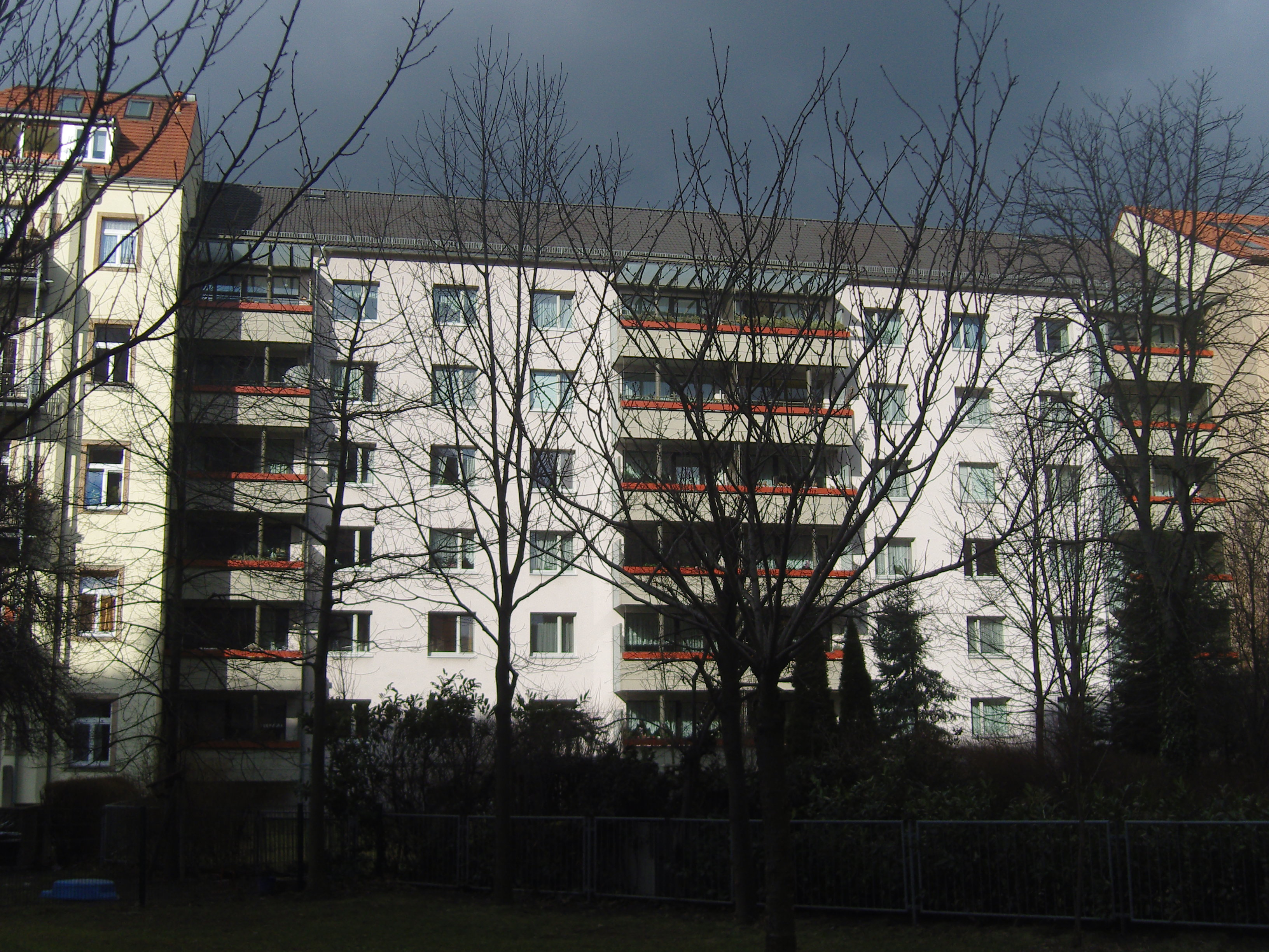 Rückansicht des Hauses Käthe-Kollwitz-Ufer 21/22 in Dresden, erbaut 1974